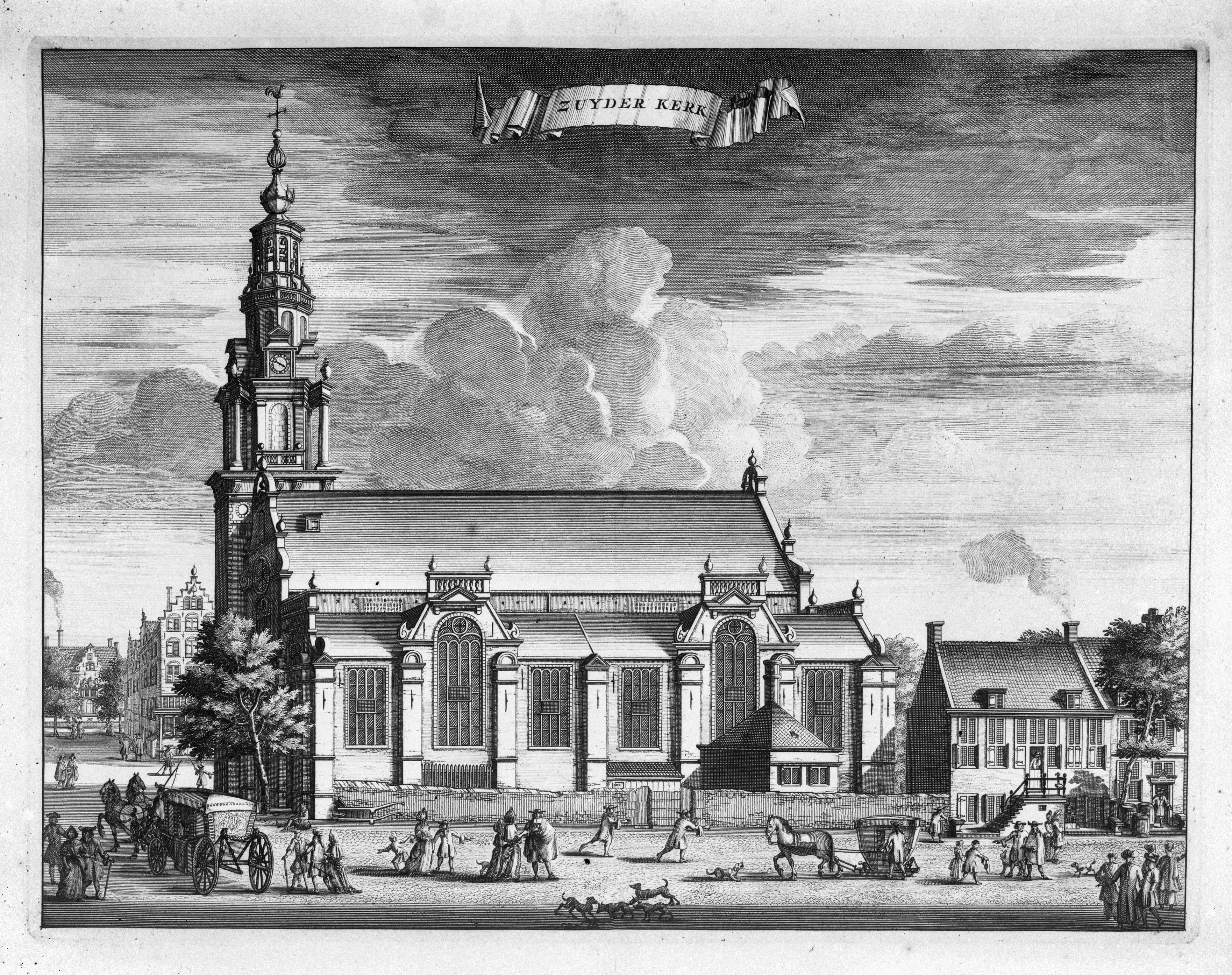 Zuiderkerk: vanuit het oosten naar gravure van plus-minus 1670